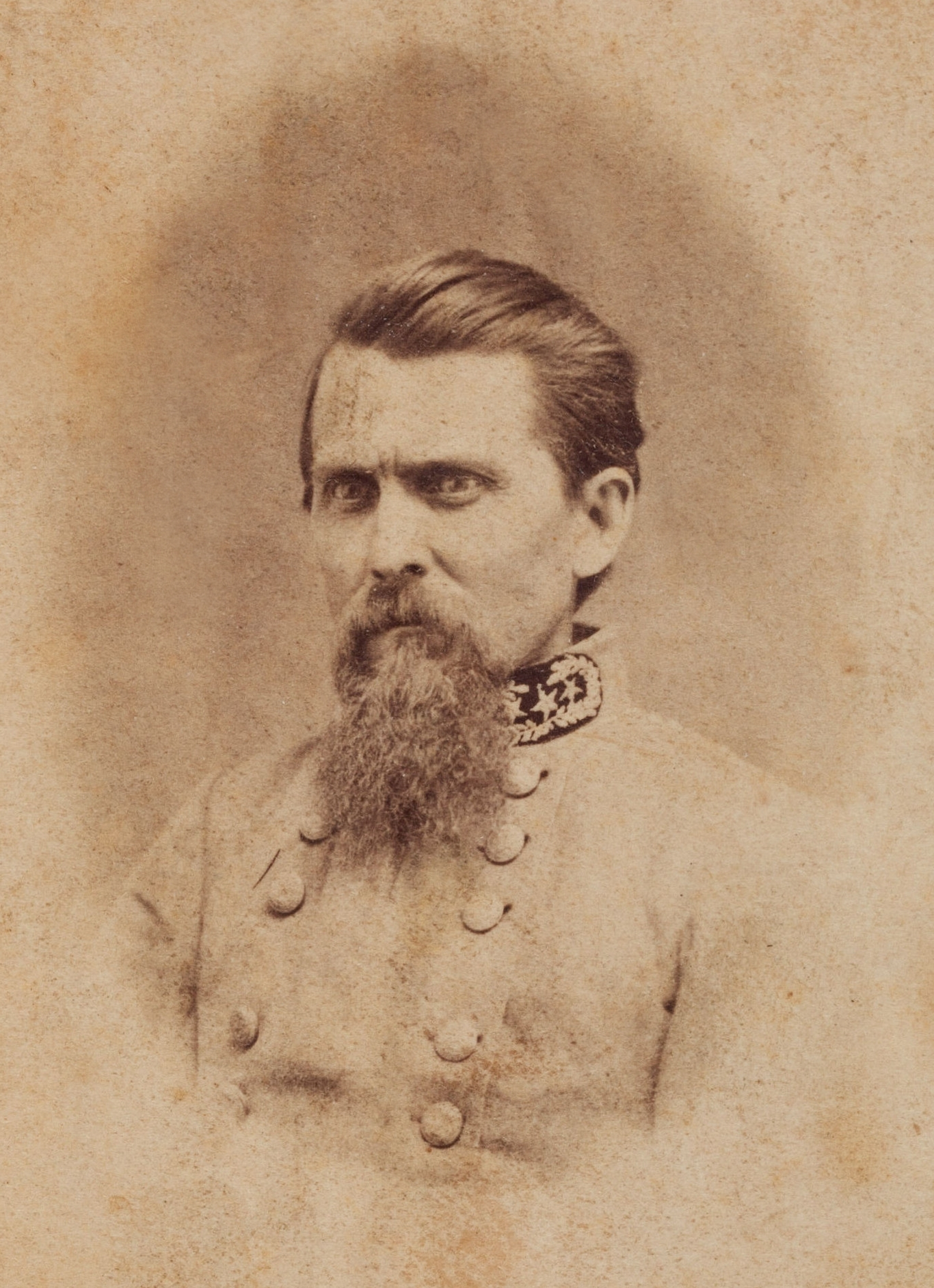 Gen. John George Walker, CSA